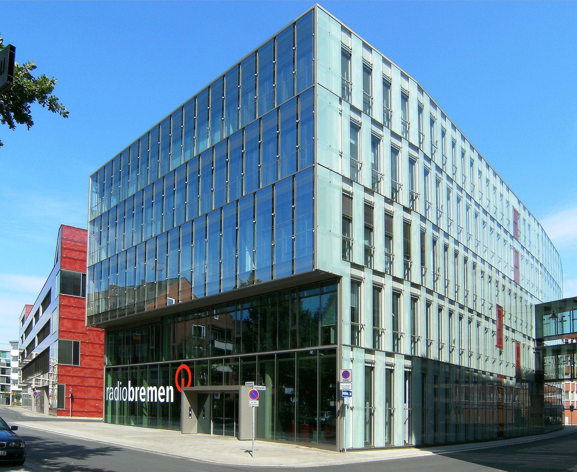 Radio Bremen, Haupteingang, Diepenau 10